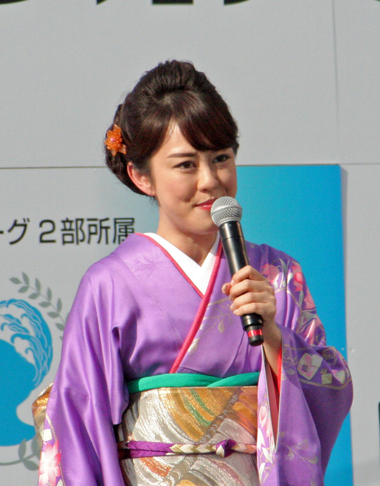 日本の演歌歌手。丘みどり。2018年5月12日、姫路お城まつりにて撮影。